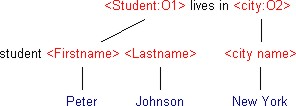 Feituitspraak ontleed volgens de methode FCO-IM